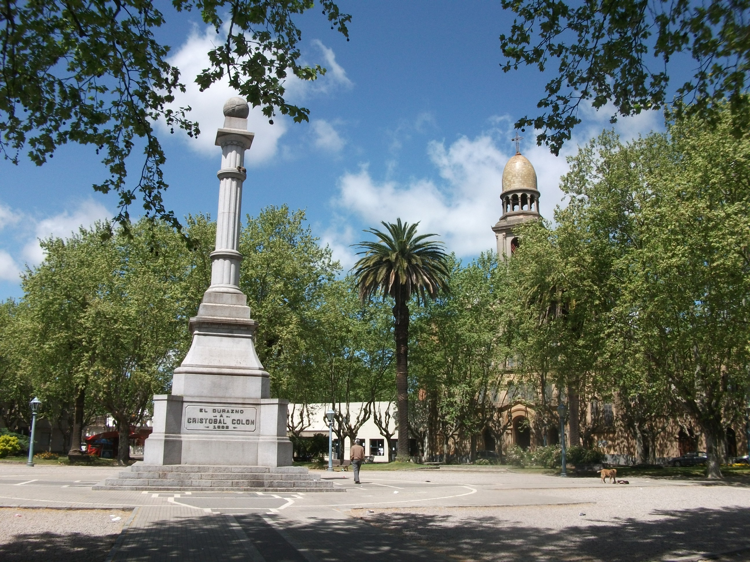 Monumento a Colón (Columna del cuarto centenario). Obra de inmigrantes y lugareños construida con aporte popular en 1892-93, su autor fue el escultor italiano Juan Azzarini, se inauguró el 25 de agosto de 1893. Es de granito gris de la zona y la columna está coronada por una esfera que contiene una caja de plomo con documentos de la época y que fueran retirados al ser abierta en 1992 al cumplir 100 años. Ahora conserva documentos de 1992 para ser conocidos en 2092. Ubicada en el departamento de Durazno